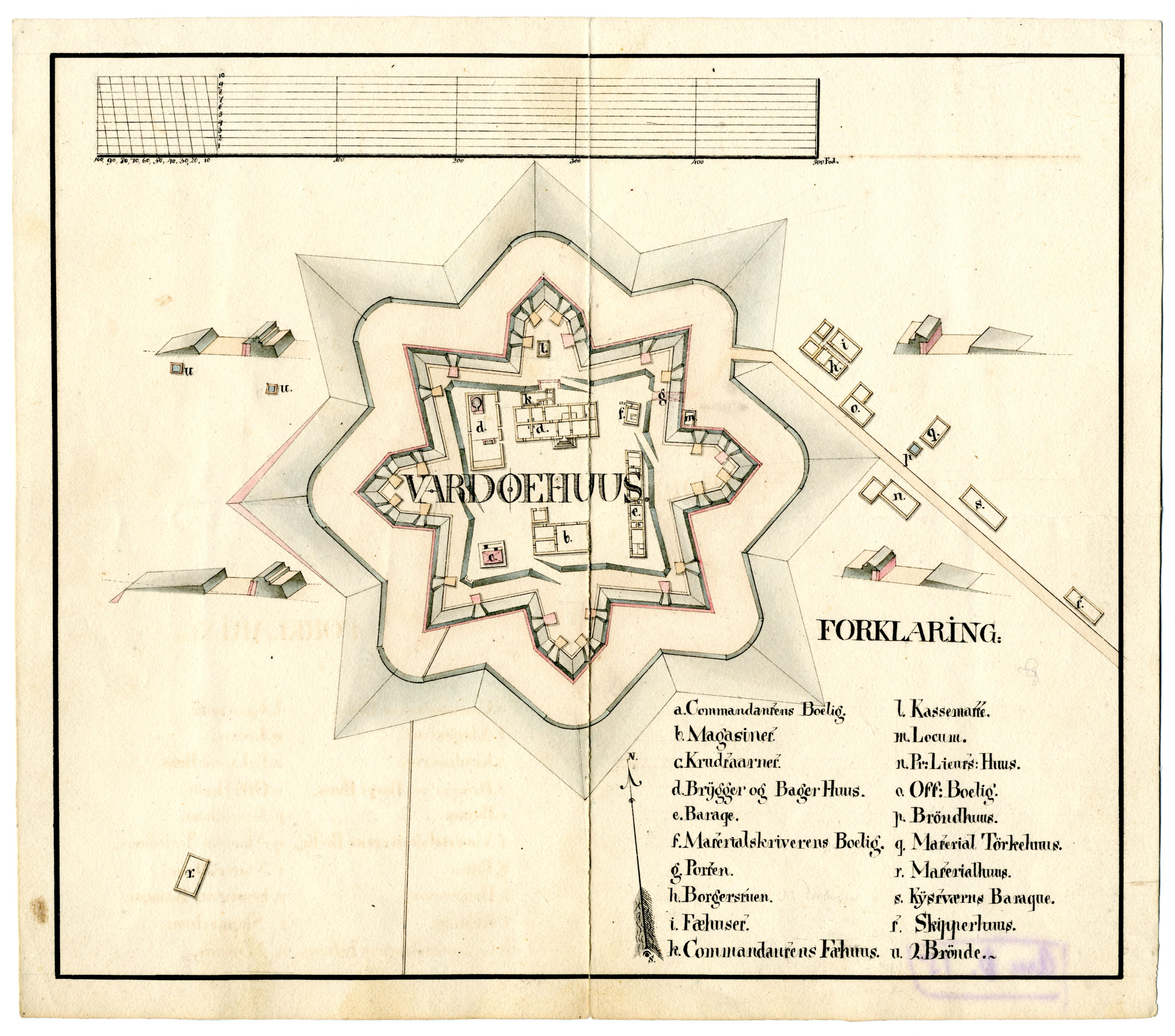 Plantegning av Vardøhus festning ca. 1817 utarbeidet for Armedepartementet. Riksarkivets kart- og tegningssamling, AD 15.